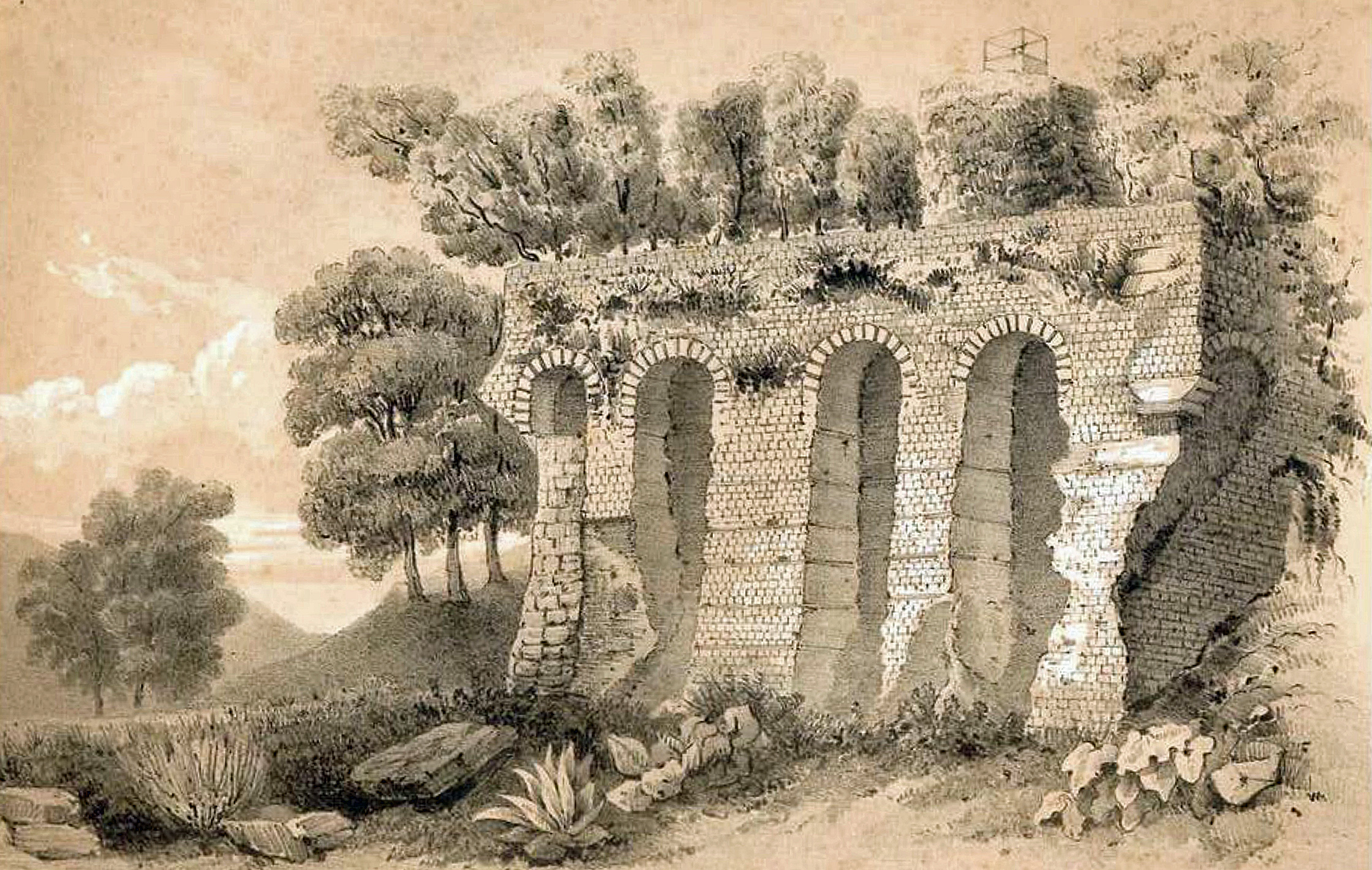 Aiguillon - Structures antiques - Lithographie se trouvant dans le livre de l'abbé Barrère, "Histoire Religieuse et Monumentale de la Gascogne", tome 1, 1855